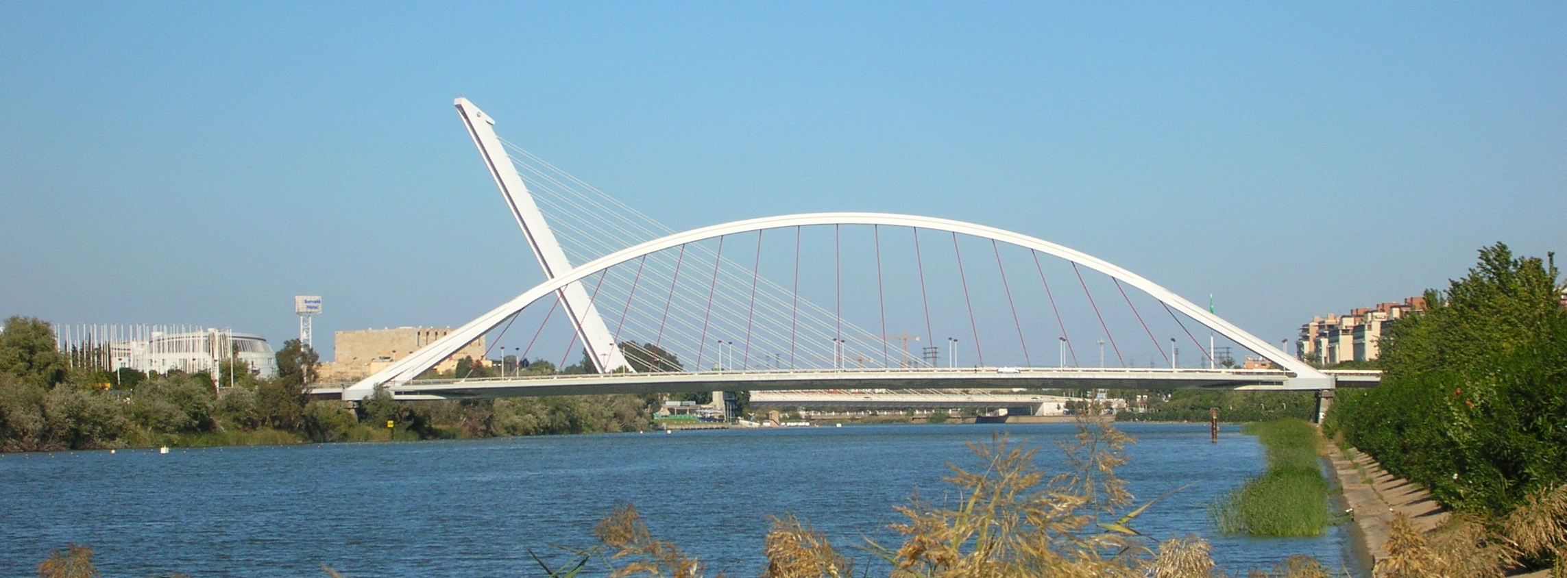 Deux ponts de Séville: le pont de la Barqueta et celui de l'Alamillo. Puente de la Barqueta, al fondo el puente del Alamillo